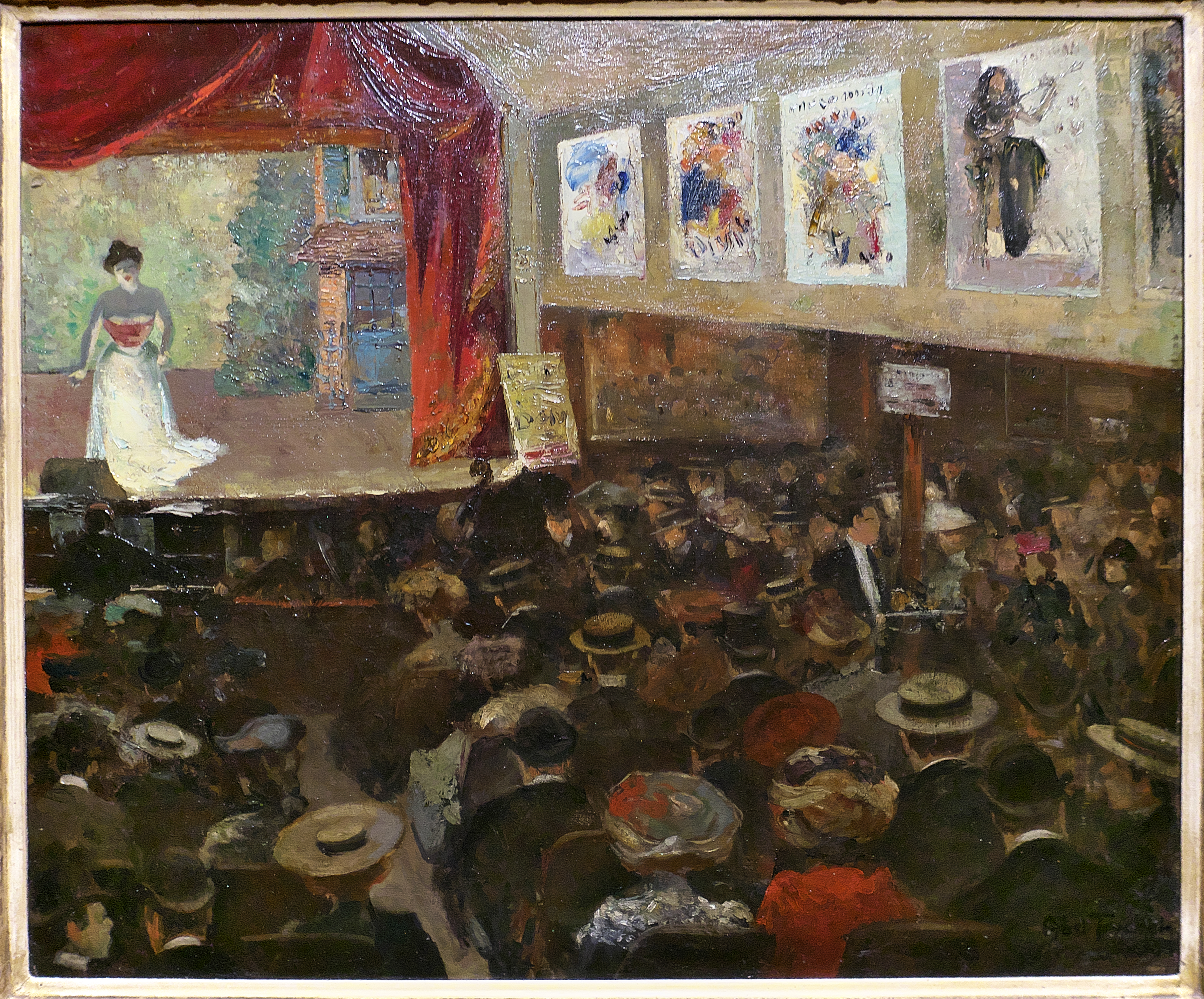 Óleo sobre lienzo (ca. 1895).